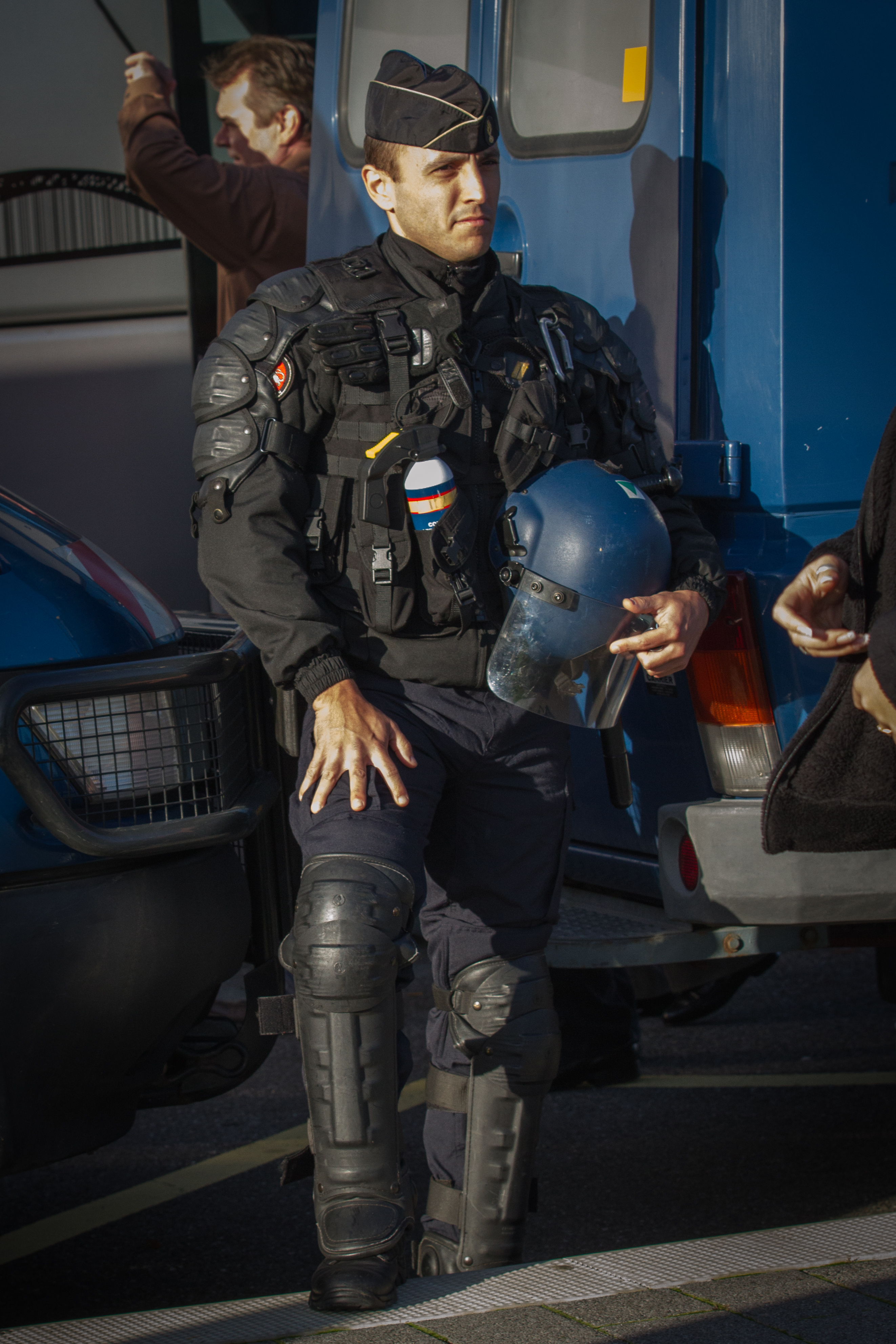 Strasbourg, manifestation des taxis devant le Parlement européen. 24 octobre 2013.